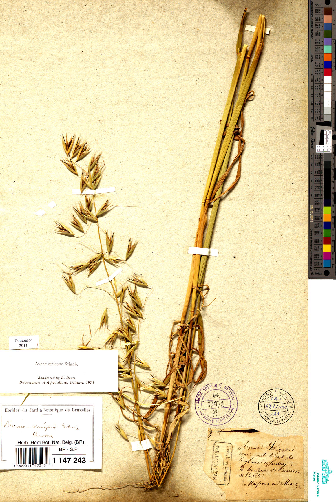 Planche de l'herbier de Marie-Anne Libert conservé dans les collections du Jardin botanique de Meise (Belgique).